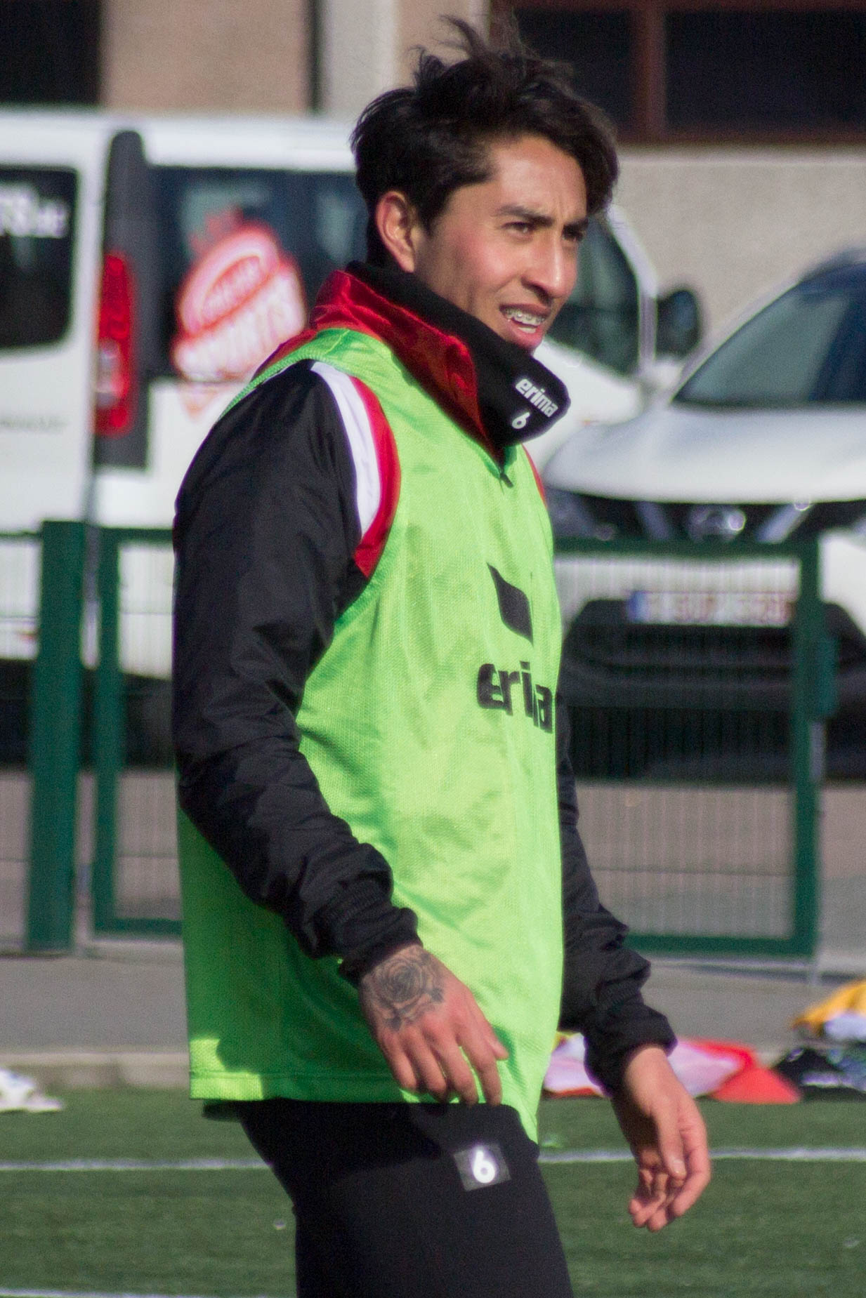 Entraînement du Royal Excel Mouscron, au Futurosport( Mouscron). Le 22 février 2018.